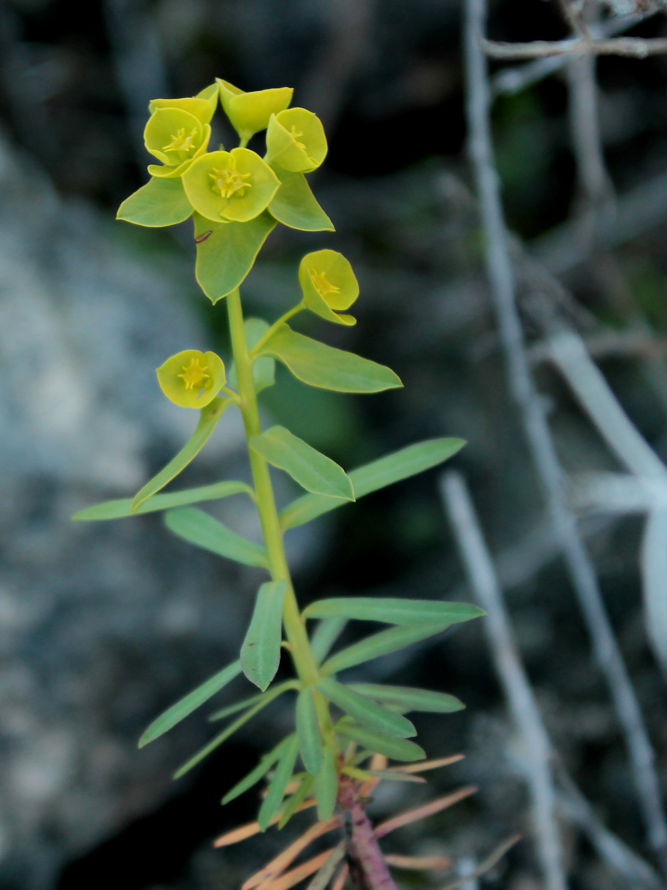 Titímalo-do-algarve